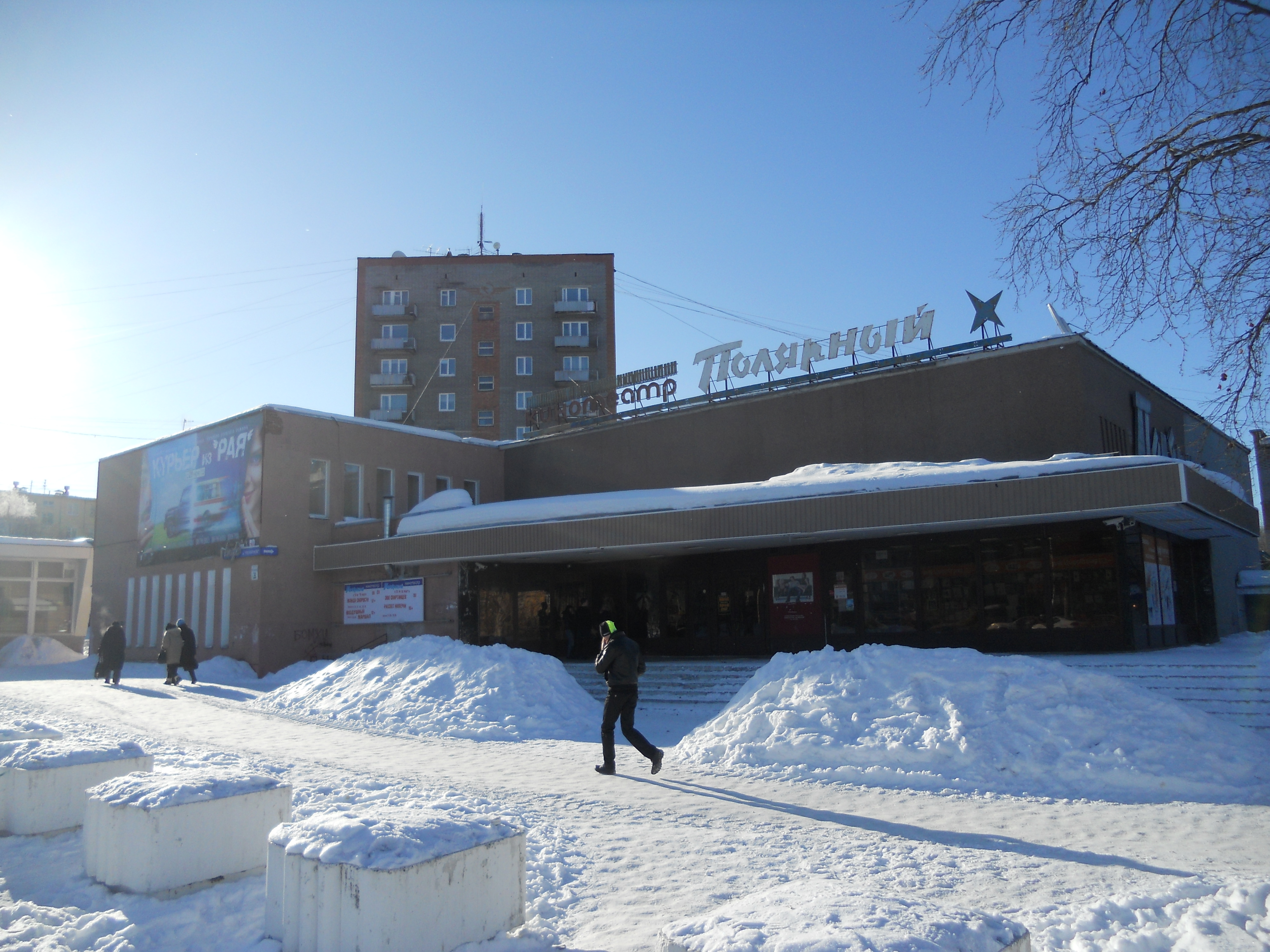 Кинотеатр Полярный